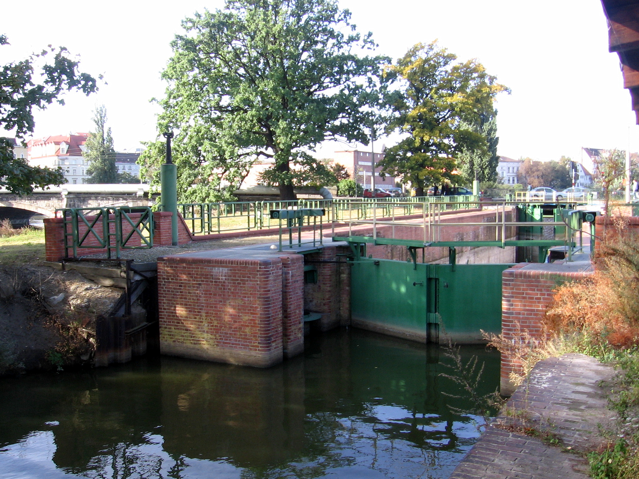 Odra w okolicach Mariny Śródmiejskiej Śluza Mieszczańska k. Mariny Śródmiejskiej we Wrocławiu, w tle Południowa Elektrownia Wodna